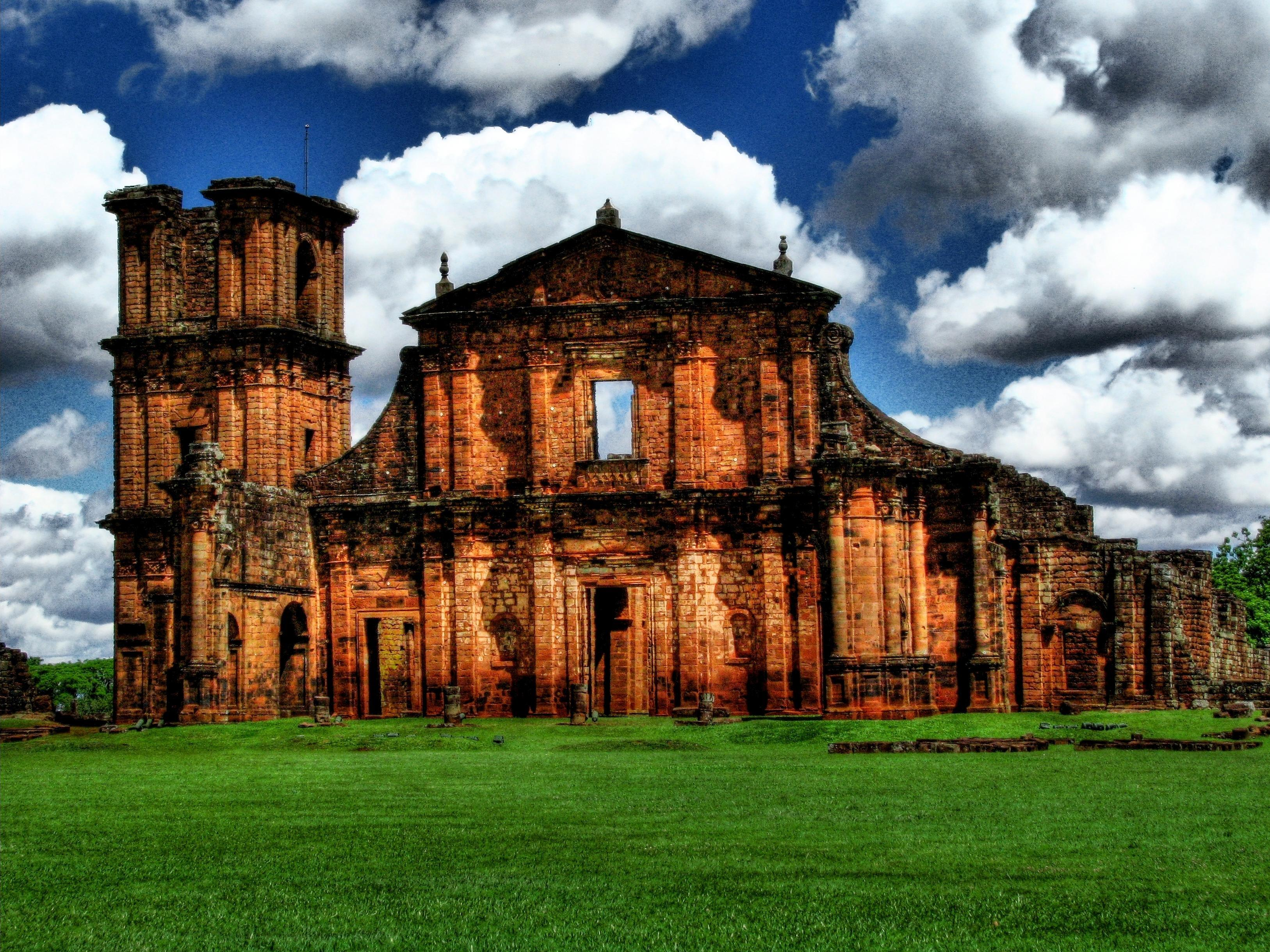 São Miguel das Missões, Brazil.